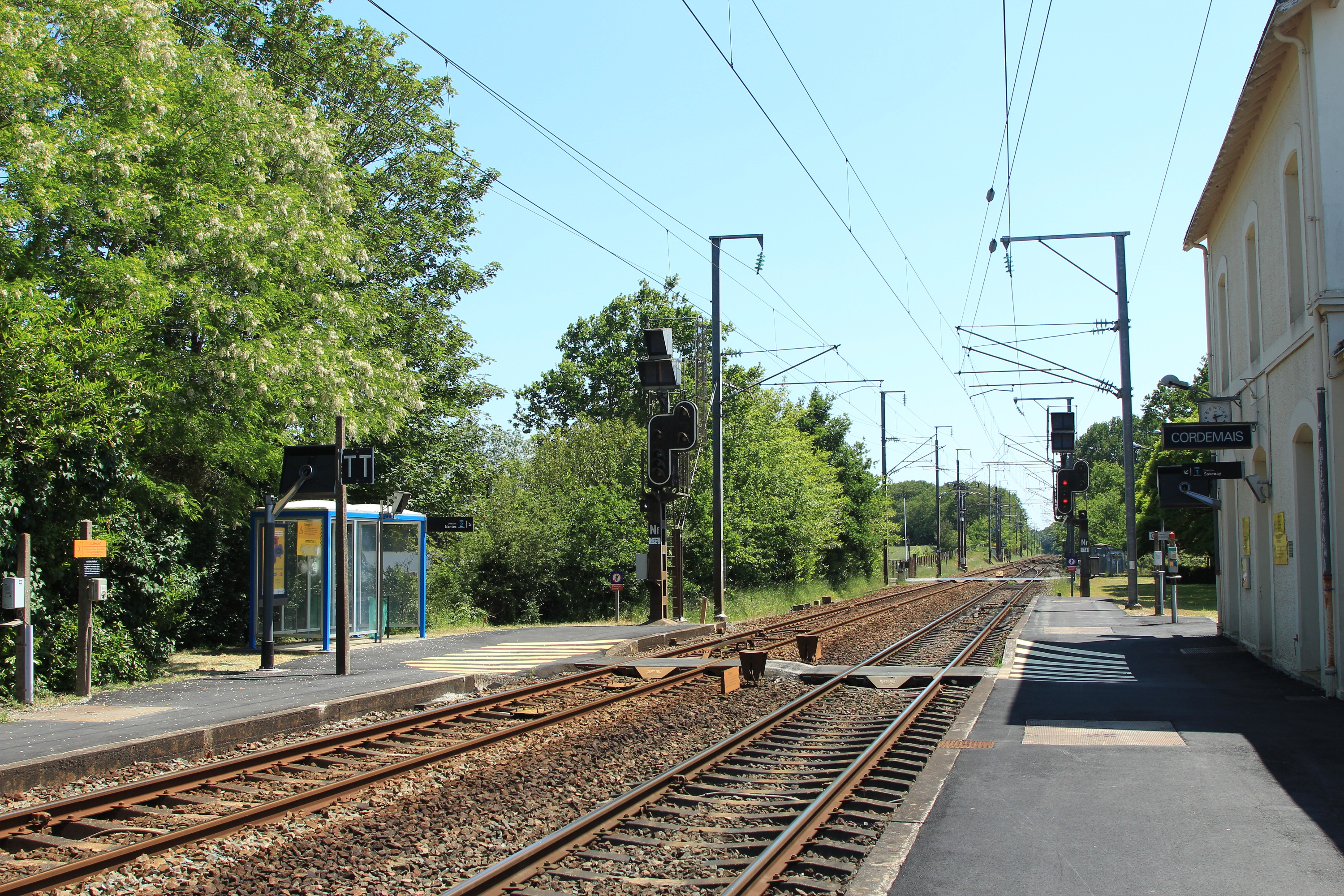 Vue des quais de la gare de Cordemais vers Nantes / Tours.